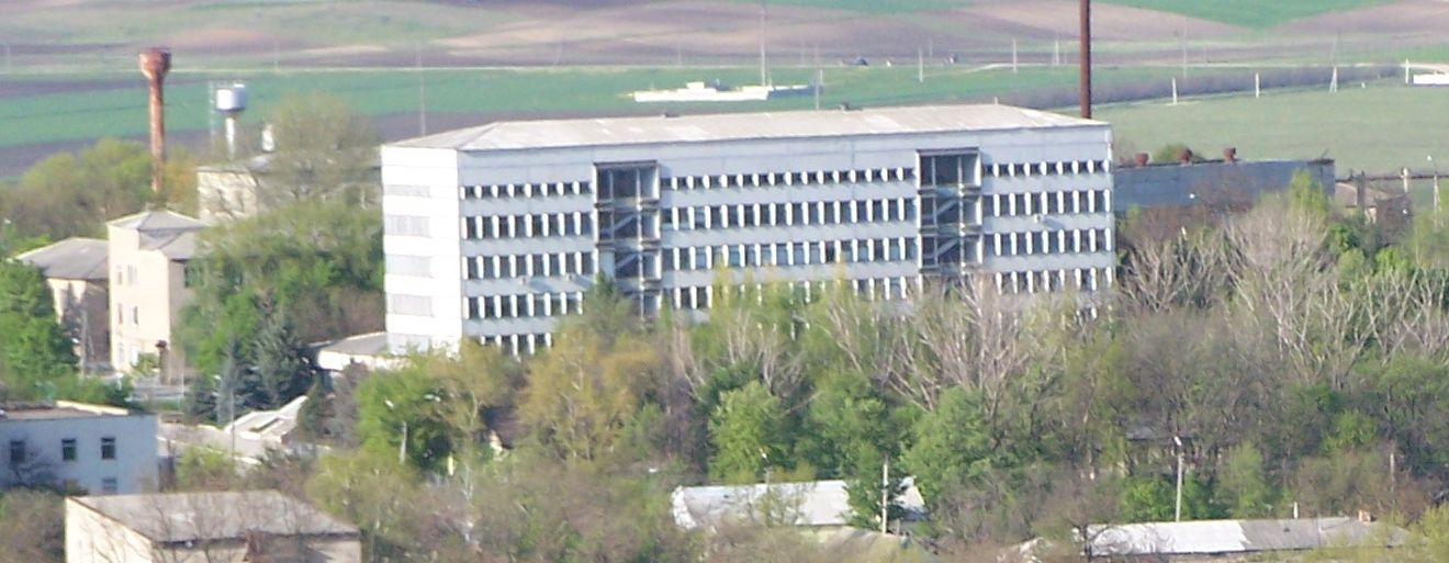 Поликлиника